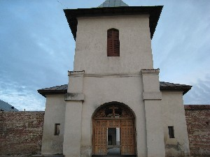 Clopotnita manastirii Glavacioc, Arges. Poza este realizata de sora mea in ianuarie 2007. 06